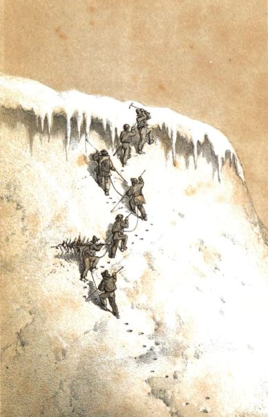 Arrivée de Sir Alfred Wills et de ses guides au sommet du Wetterhorn en 1854